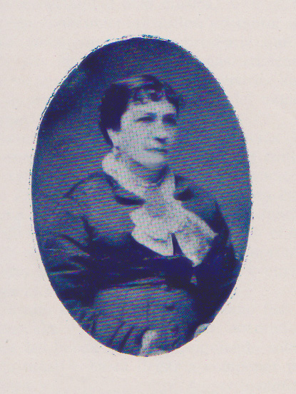 Fotografìa de Modesta Sanginés Uriarte